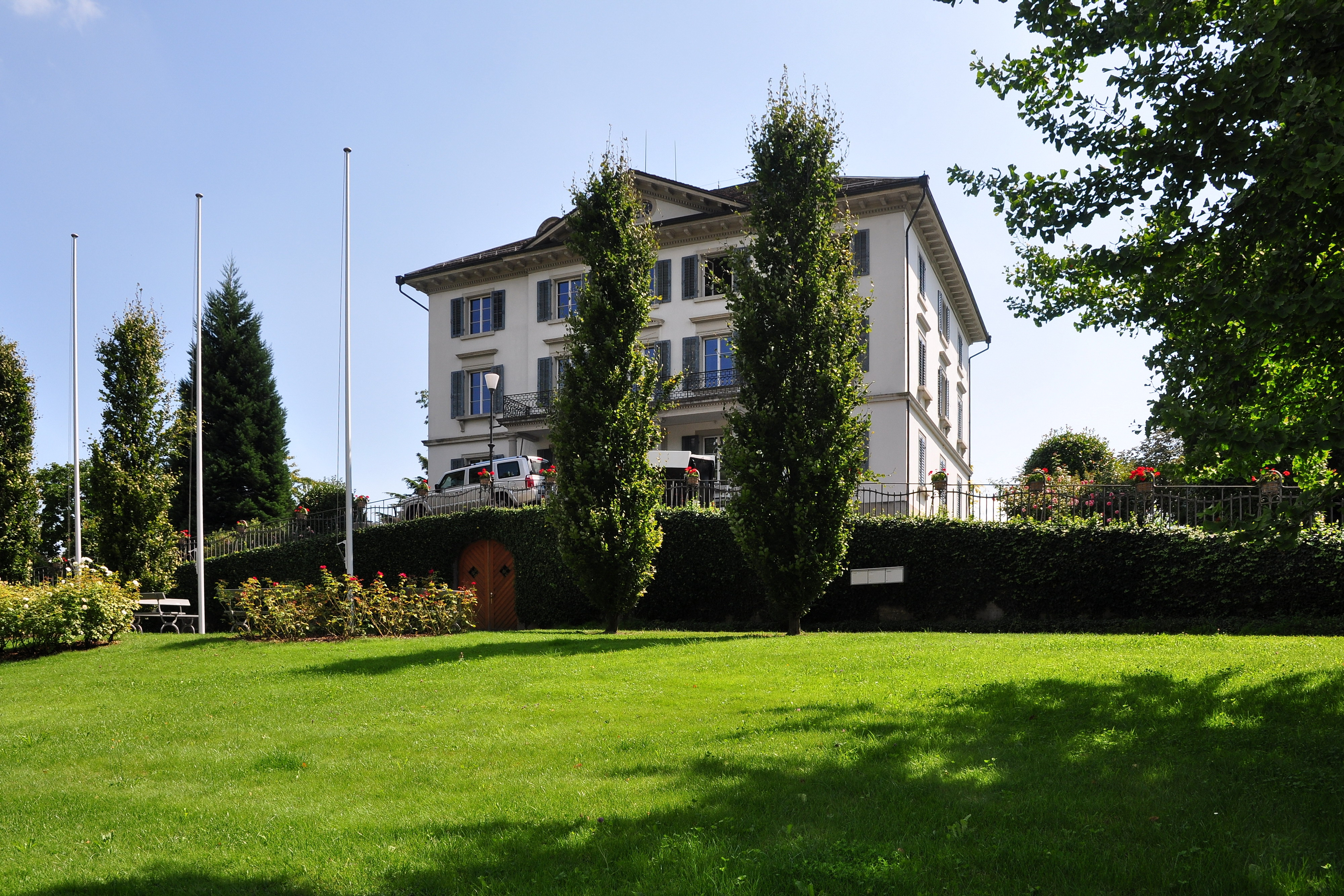 Landsitz Rosenberg, Alte Landstrasse 1/3 in Hombrechtikon (Switzerland)